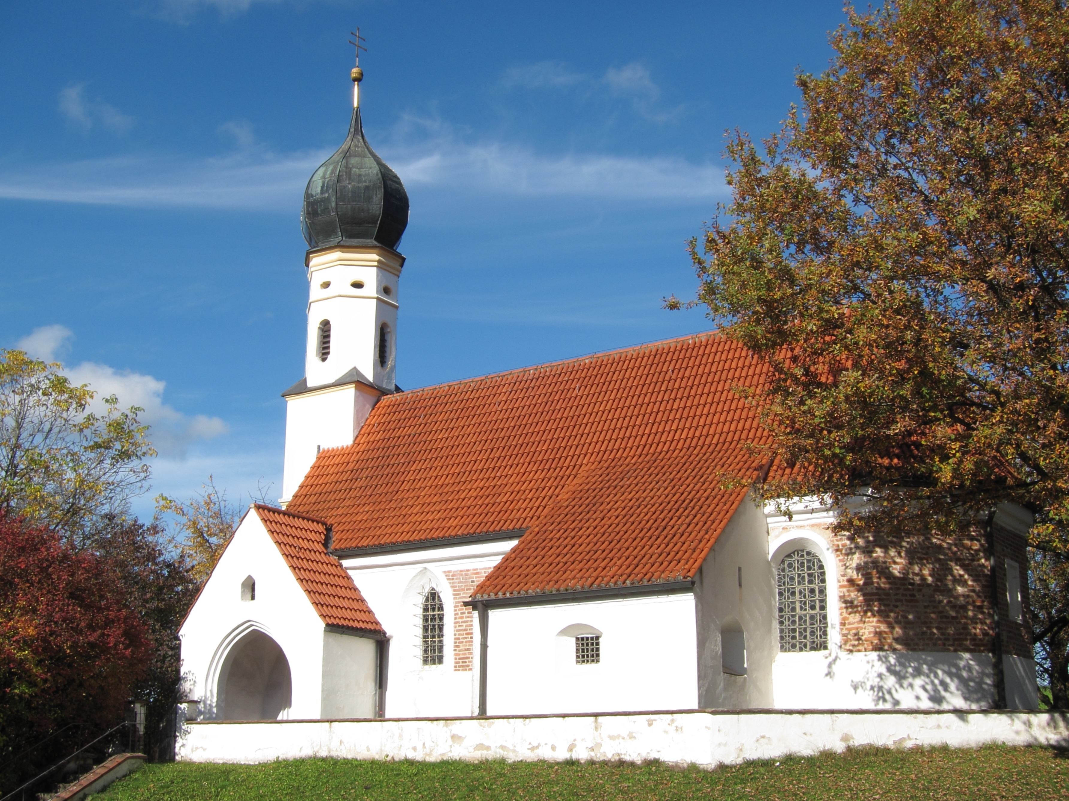 Katholische Filialkirche St. Ulrich; spätgotischer Backsteinbau mit Westturm und Zwiebelhaube, um 1500; mit Ausstattung.